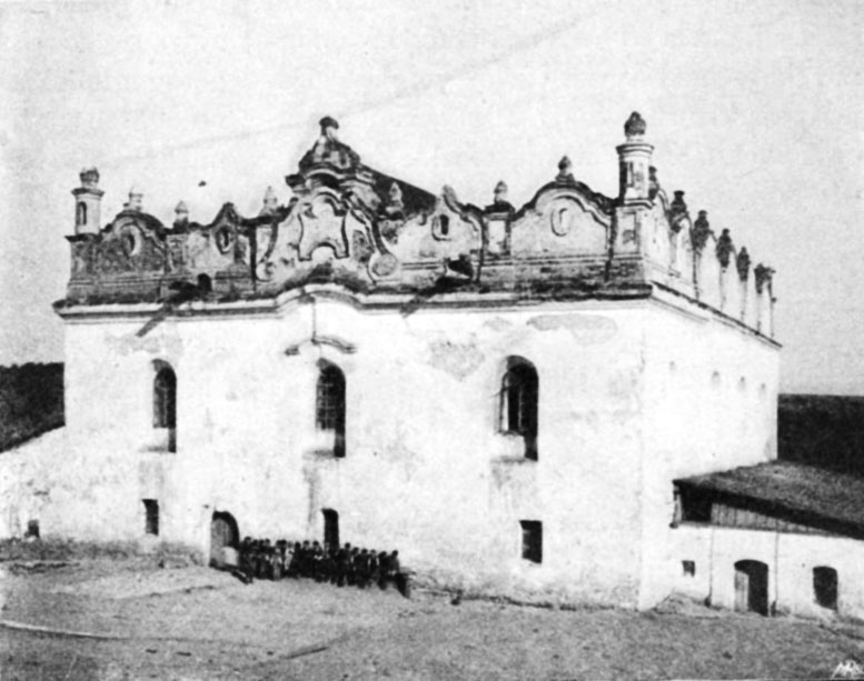 ilustracja z książki Zygmunta Glogera "Encyklopedia staropolska tom I" publikacja Wydawnictwa Piotra Laskauera i S-ki Warszawa 1900